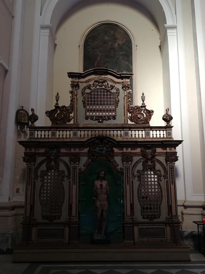 Dipinto e .....